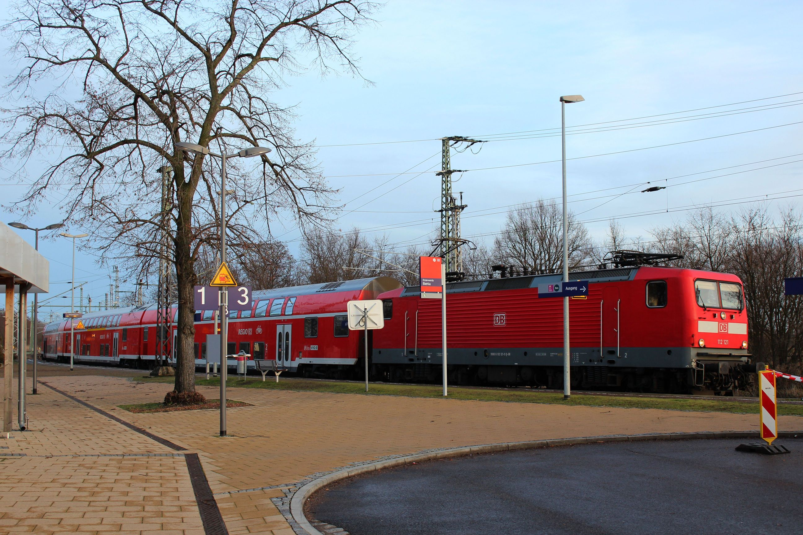 Bahnhof Elsterwerda-Biehla.